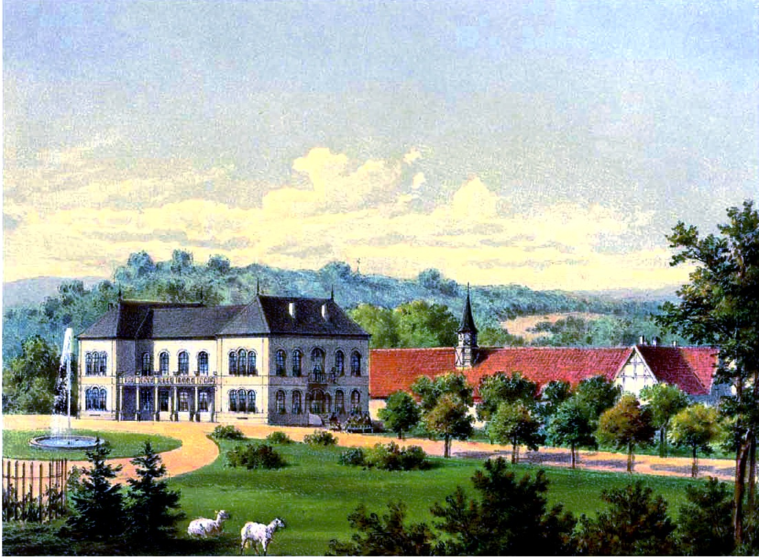 Schloss Rittershain, Kreis Rotenburg, Provinz Hessen